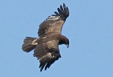 Aquila pomarina in Lasy Janowskie, Poland